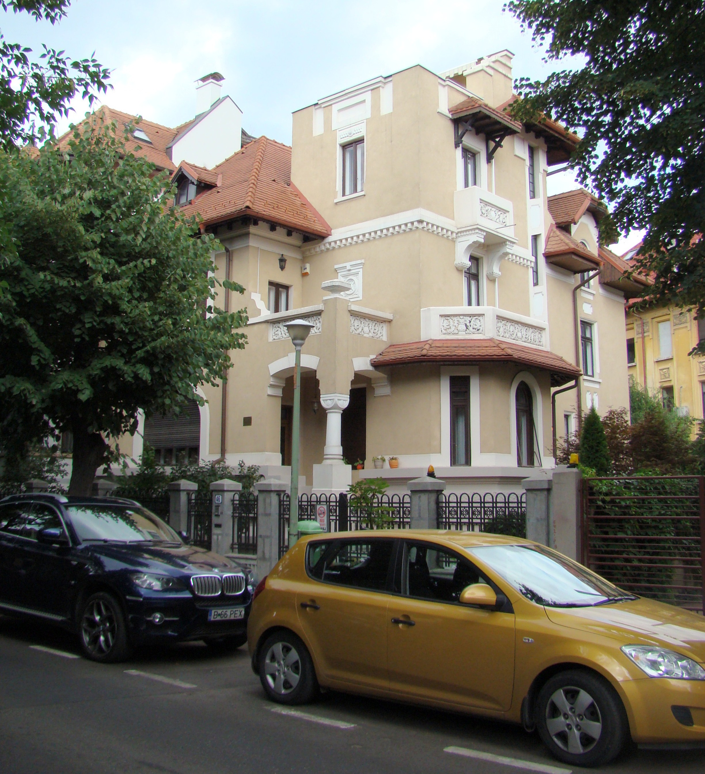 Casă monument istoric, str.Londra, nr.46